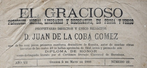 EL GRACIOSO, periódico moral, literario y recreativo, en prosa y verso. Propietario director y único redactor D. JUAN DE LA COBA GOMEZ. 5 de mayo de 1889